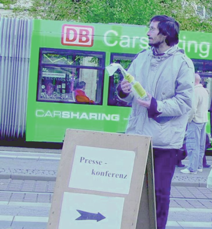 Jörg Bergstedt im Rahmen der "Direct Action Tage" im Oktober 2003 in Magdeburg